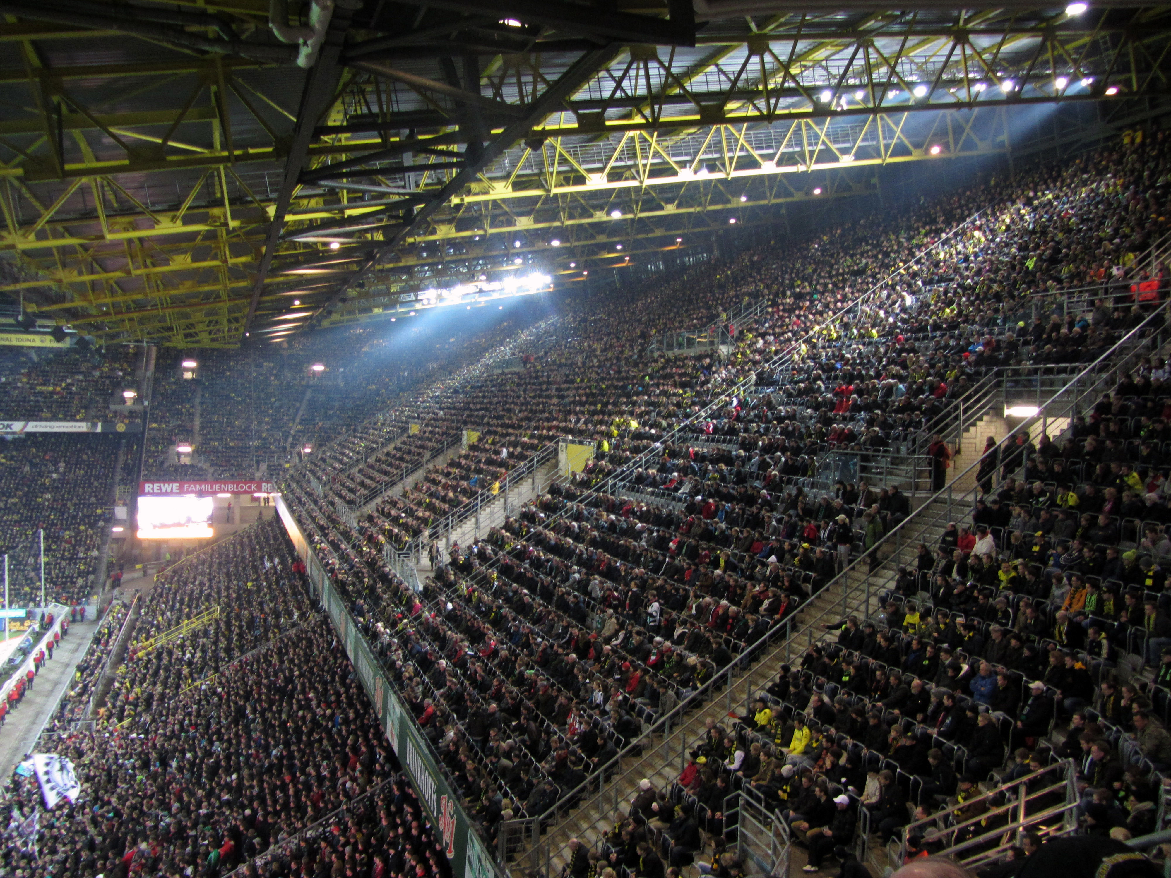 Signal Iduna Park (Westfalenstadion), Borussia Dortmund–Hannover 96, 26-Feb-2012, Nordtribüne